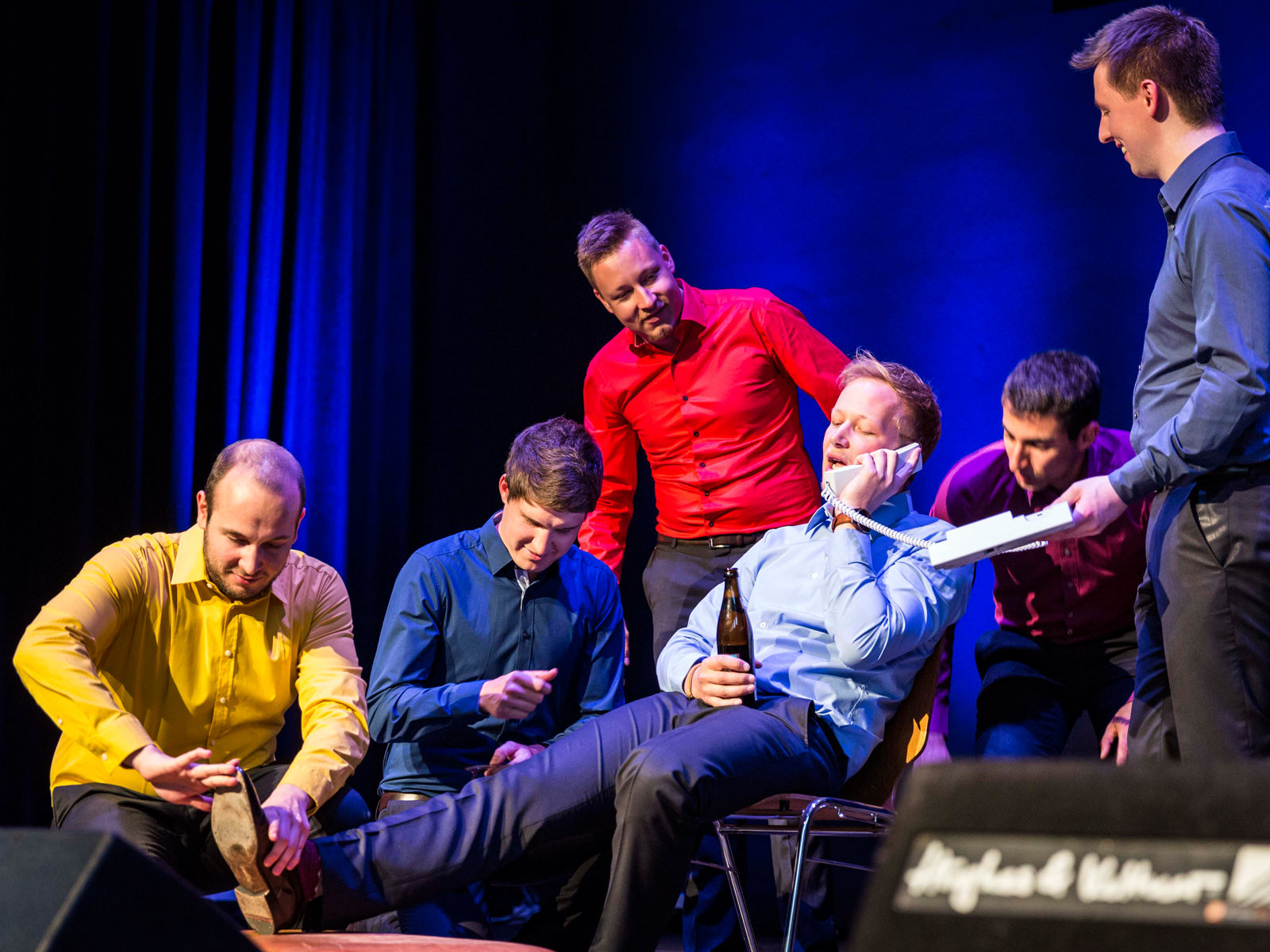 MA'cappella in der Kulturhalle Zöschingen (2016)